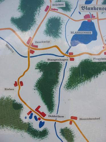 Karte Stangenhagen Brandenburg. Ausschnitt aus der Infotafel in Blankensee